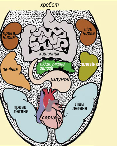 Візуальне розташування органів на поверхні язика. Фотографія відфотошоплена, оригінал фотографії на російській мові, взятий з сайту